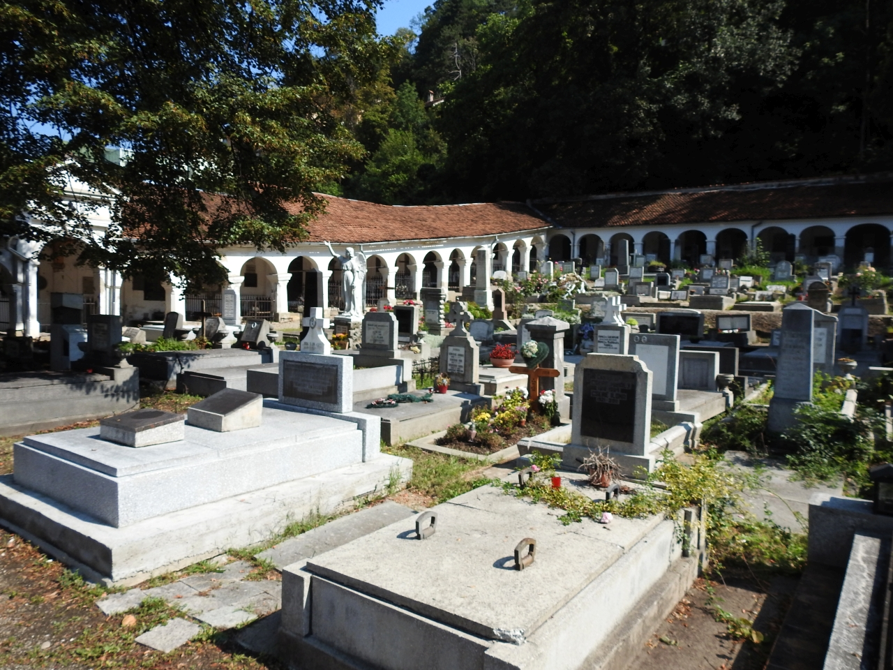 Cimitirul evanghelic „Brașovul Vechi” 01